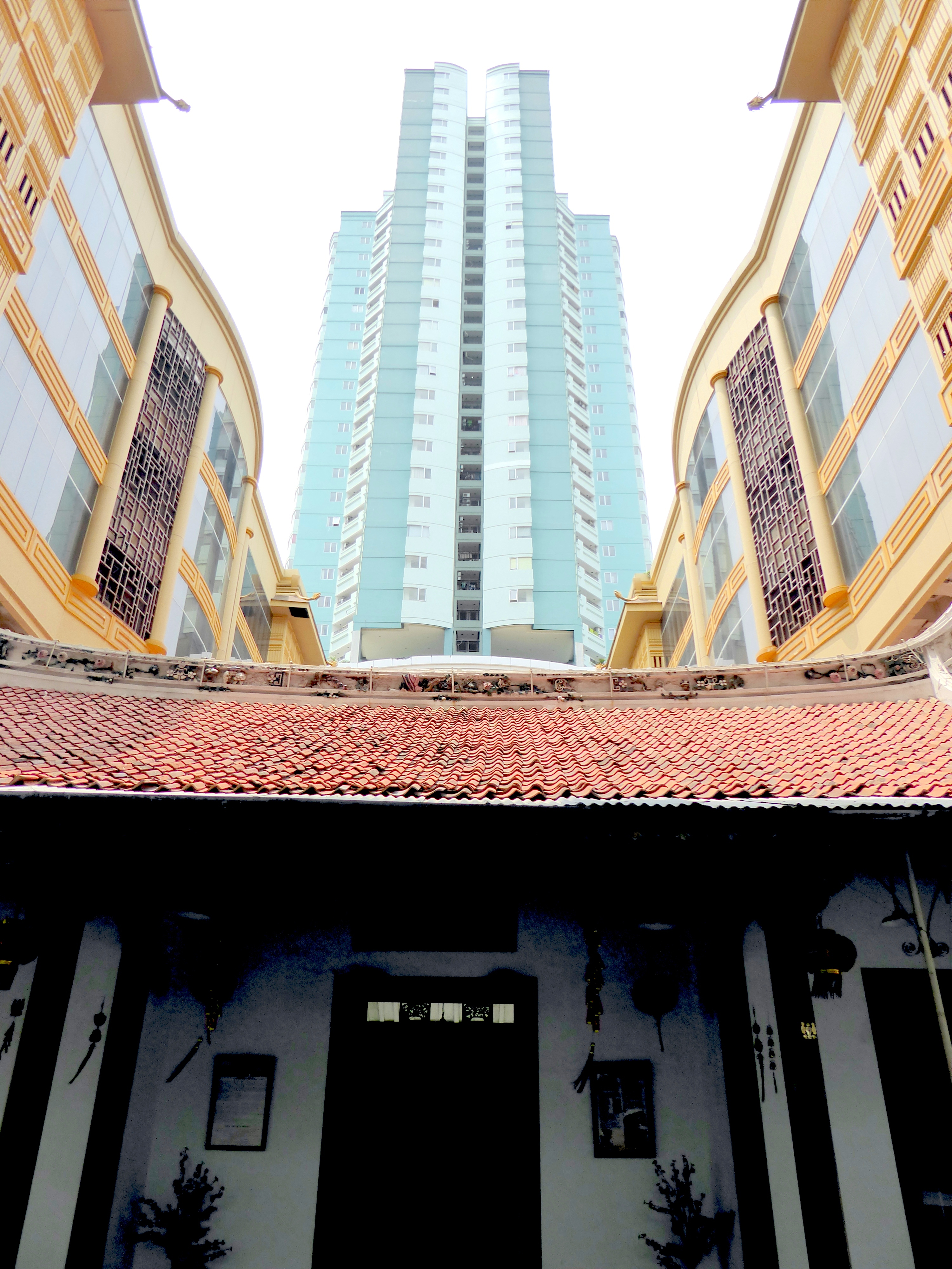 004 Skyscraper Overhead, Chandra Naya, Jakarta, Java